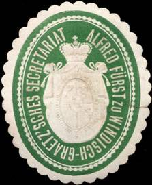 Sealing stamp Title: Alfred Fürst zu Windisch-Graetzsches Secretariat Description: grün, weiß, geprägt Place: size: 4x3 cm